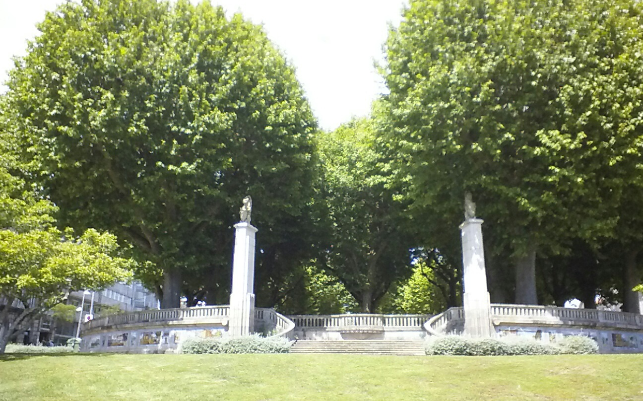 Entrada oeste de la alameda con figuras de leones en Pontevedra capital